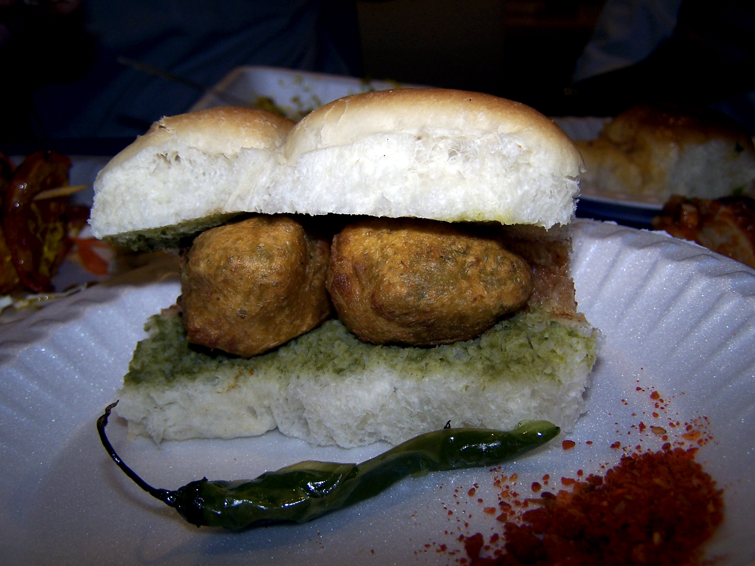 Vadapav, a Maharashtrian snack food